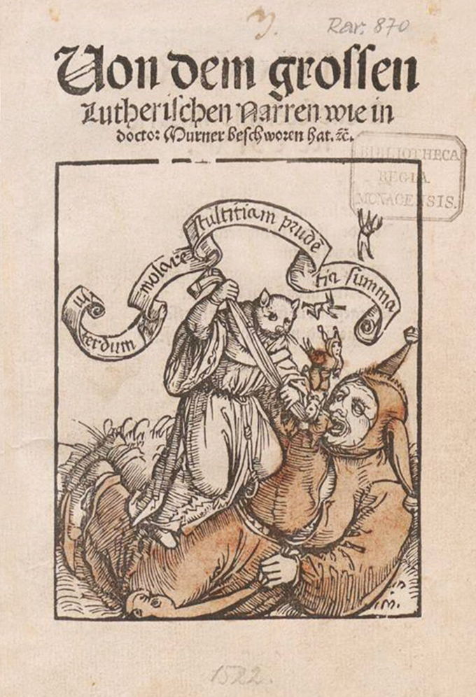 Titelblatt der Flugschrift Thomas Murner: Von den grossen lutherischen Narren, Strassburg: Grüninger, 1522